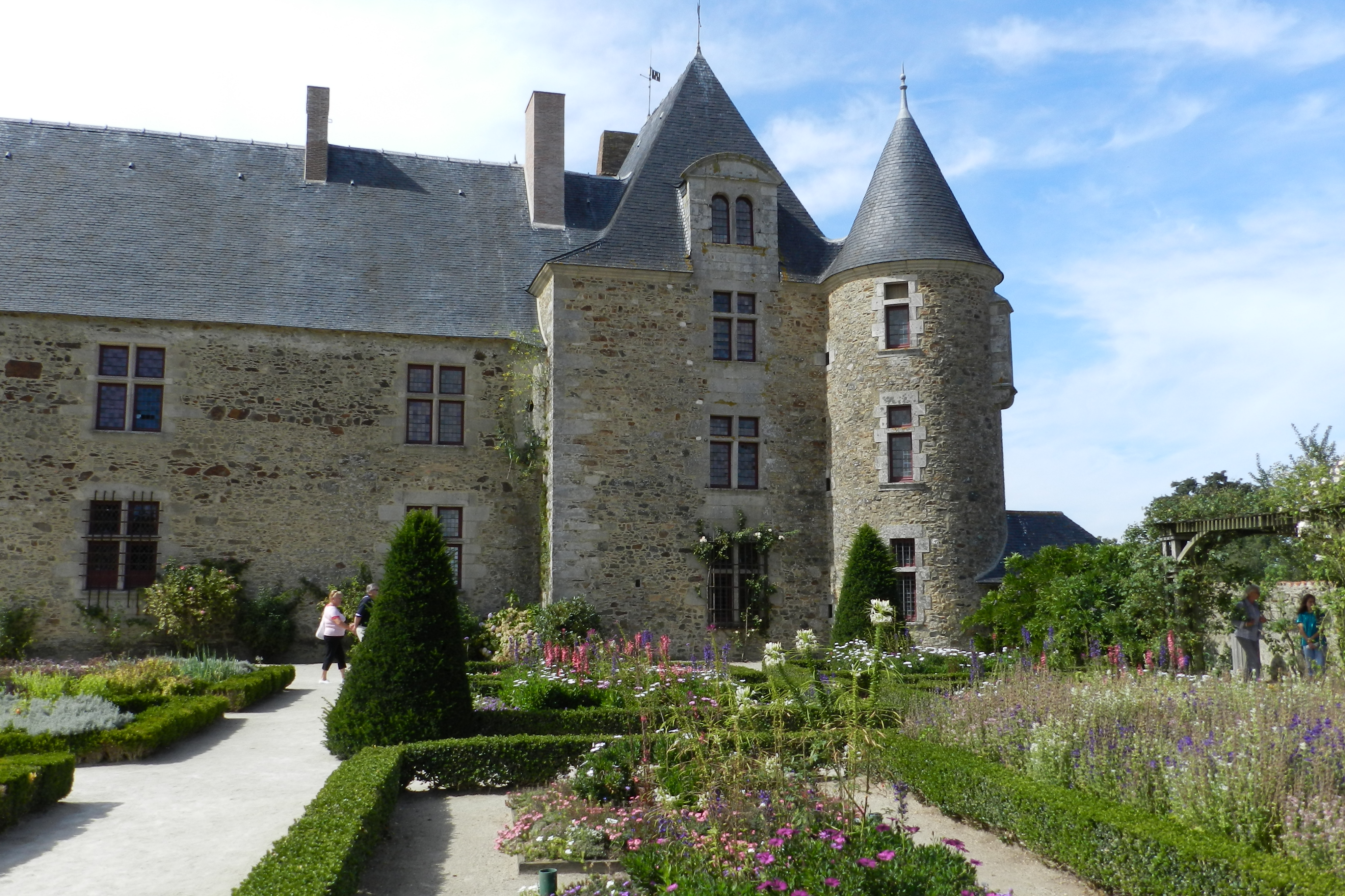 Jardins et logis de La Chabotterie en Saint-Sulpice-de-Verdon (85). .